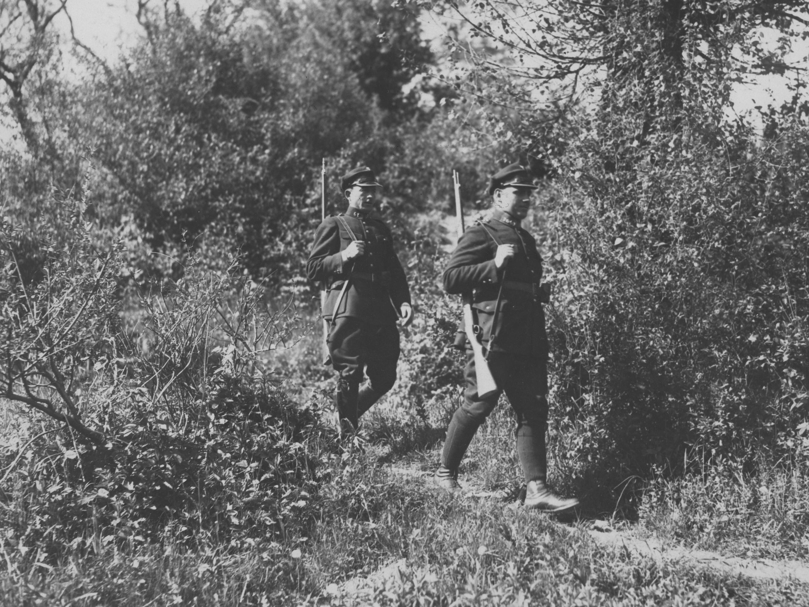 Funkcjonariusze Straży Celnej na patrolu. Koncern Ilustrowany Kurier Codzienny - Archiwum Ilustracji. Sygnatura: 1-G-6481